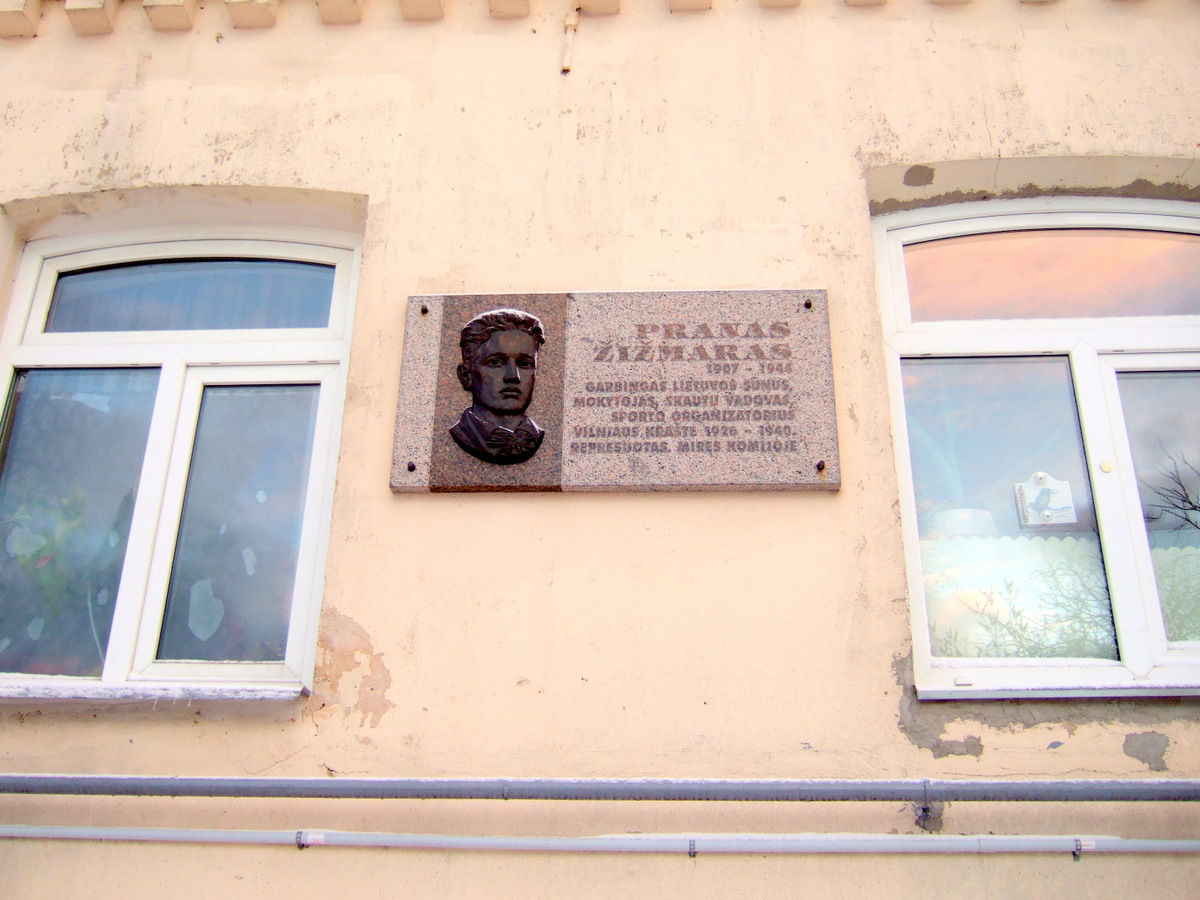 Paminklinė lenta P. Žižmarui Vilniuje